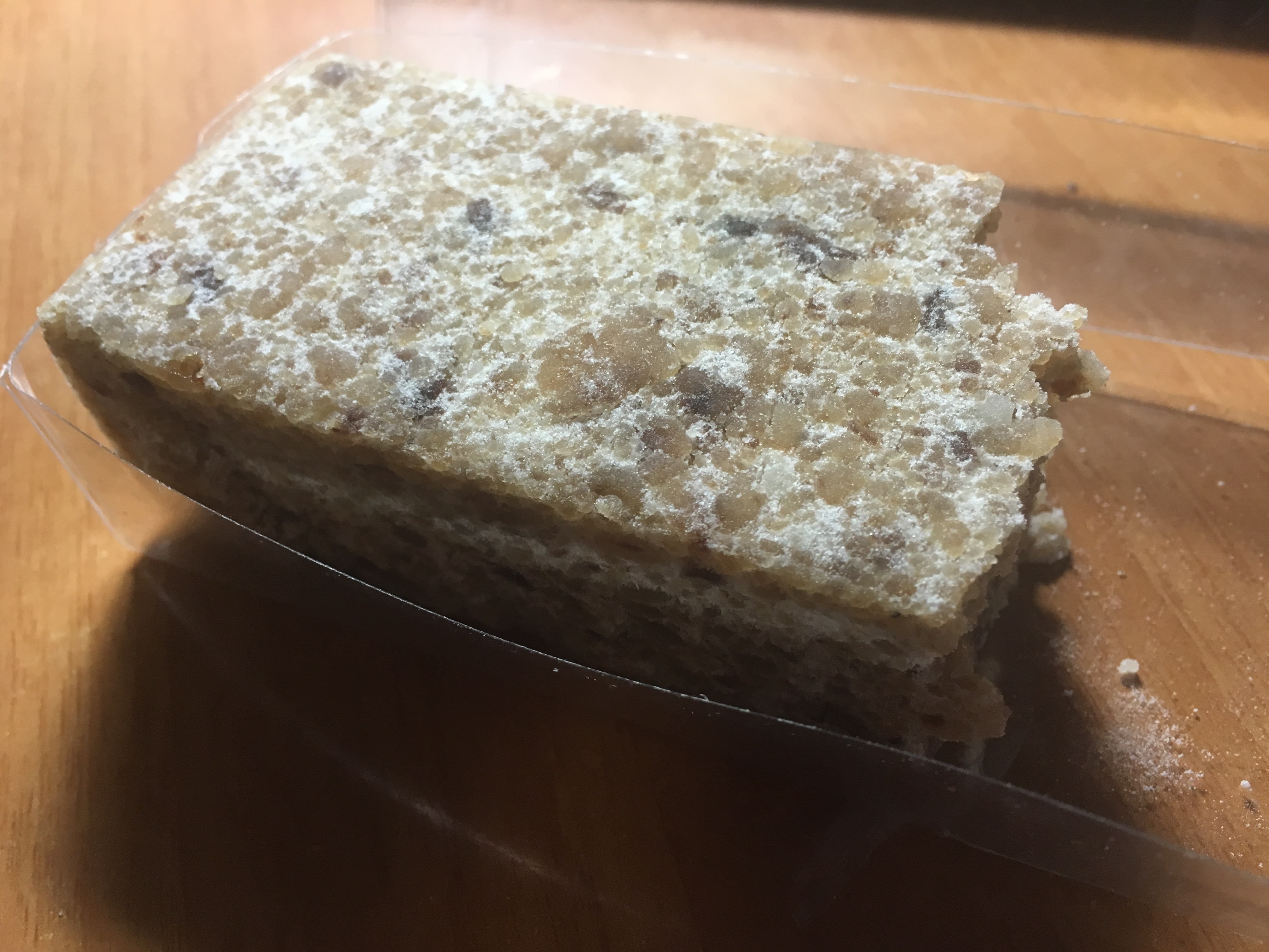 中文（中国大陆）: 一块芡实糕